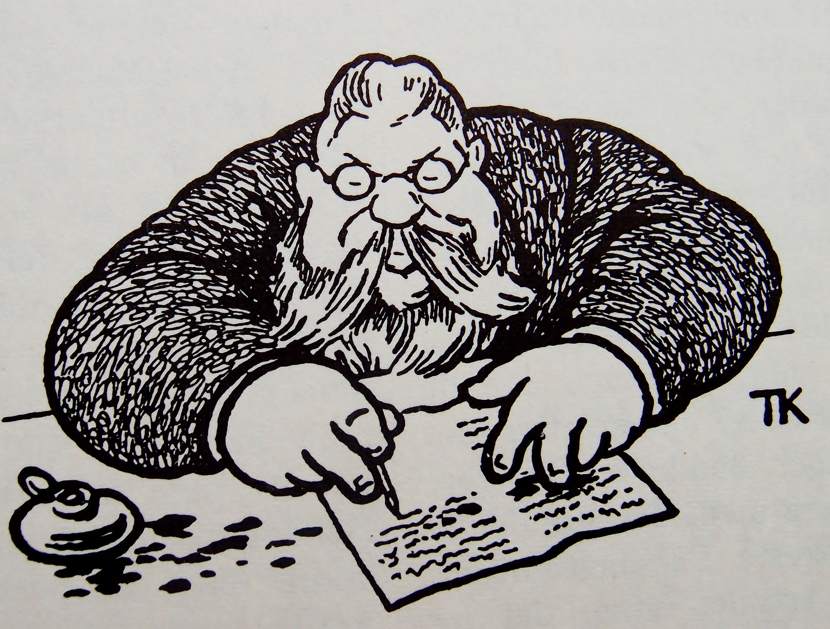 Redaktør Syvertsen i Trangvikposten i Theodor Kittelsen sin strek.